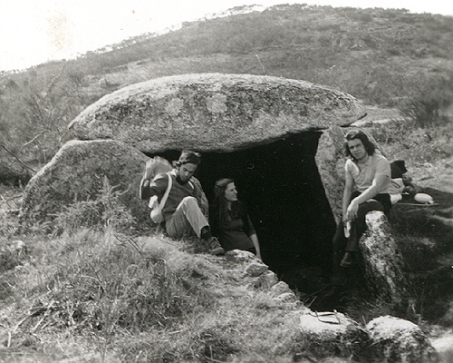 Anta da Aboboreira - dolmen - Baião Portugal 1973